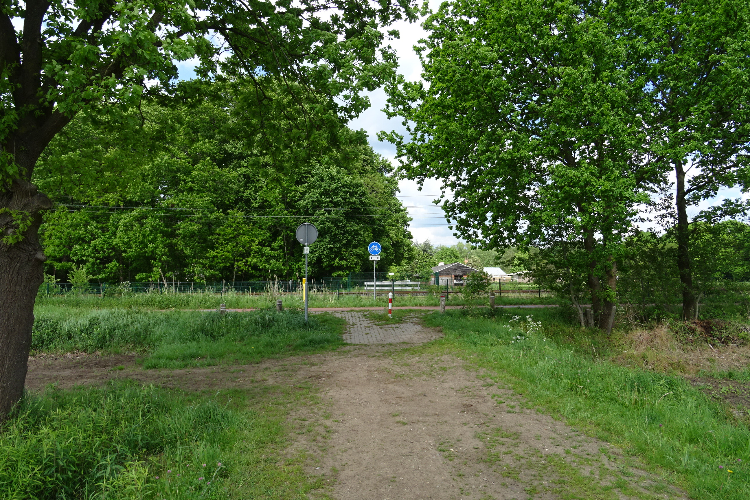 Voormalige Stopplaats De Waarbeek lag bij de onbewaakte overgang van de Belderweg aan deSpoorlijn Zutphen - Glanerbeek. Deze overgang is rond 2011 opgeheven.